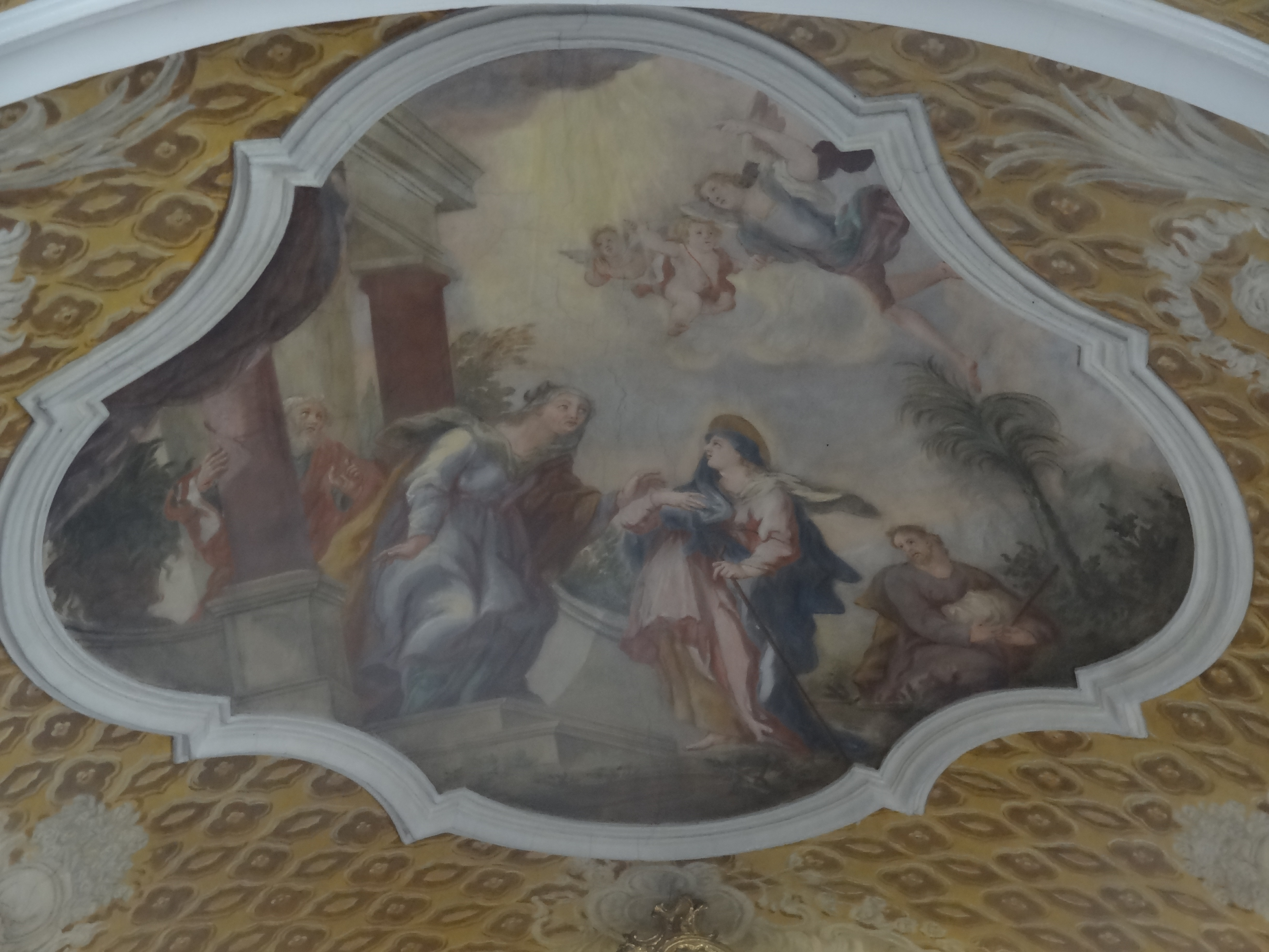 Deckenfresko im Chor der Pfarrkirche Mariä Heimsuchung in Ergolding